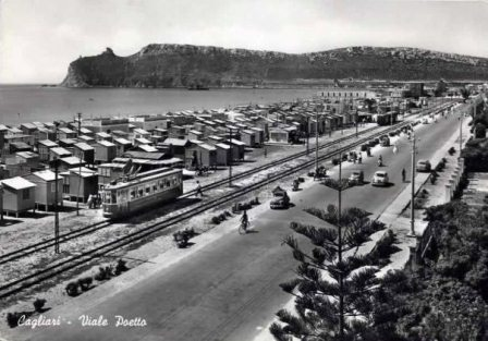 Cagliari - Tram al Poetto